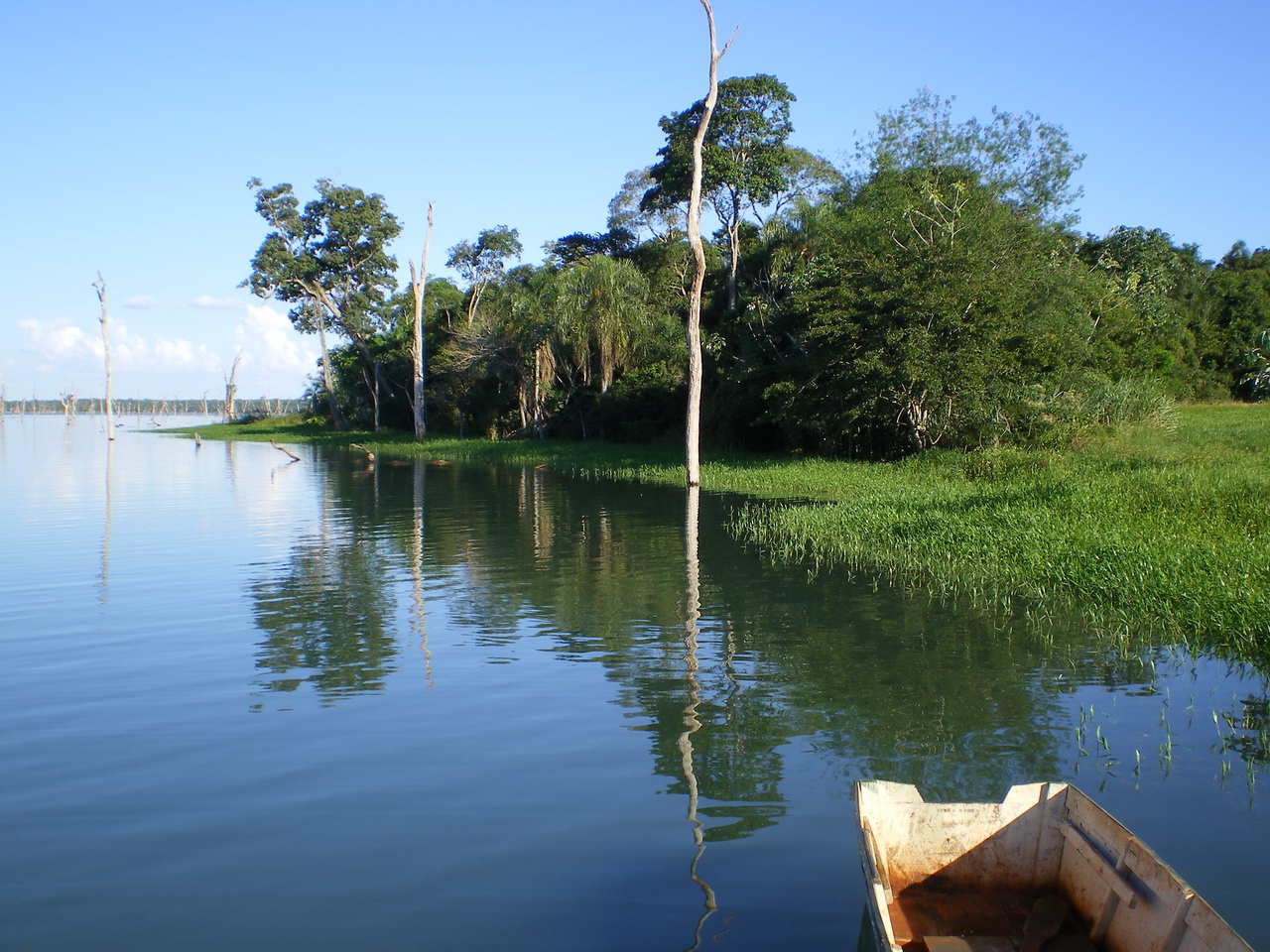 Fotos de los refugios y reservas de Itaipu, tomadas en los años 2007 y 2008 por mí Reserva de Limoy